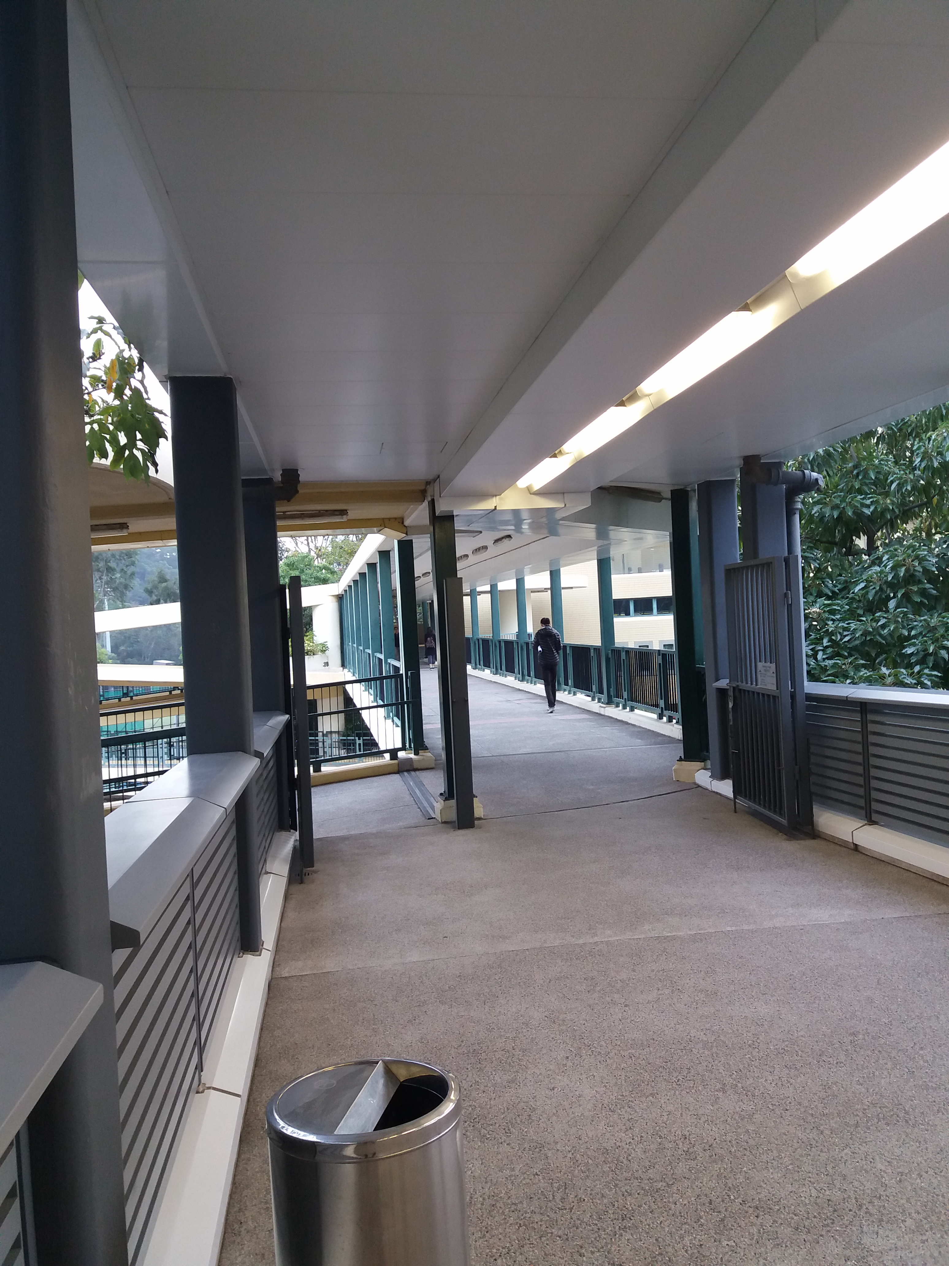 香港浸會大學 浸會橋，連接善衡校園及逸夫校園